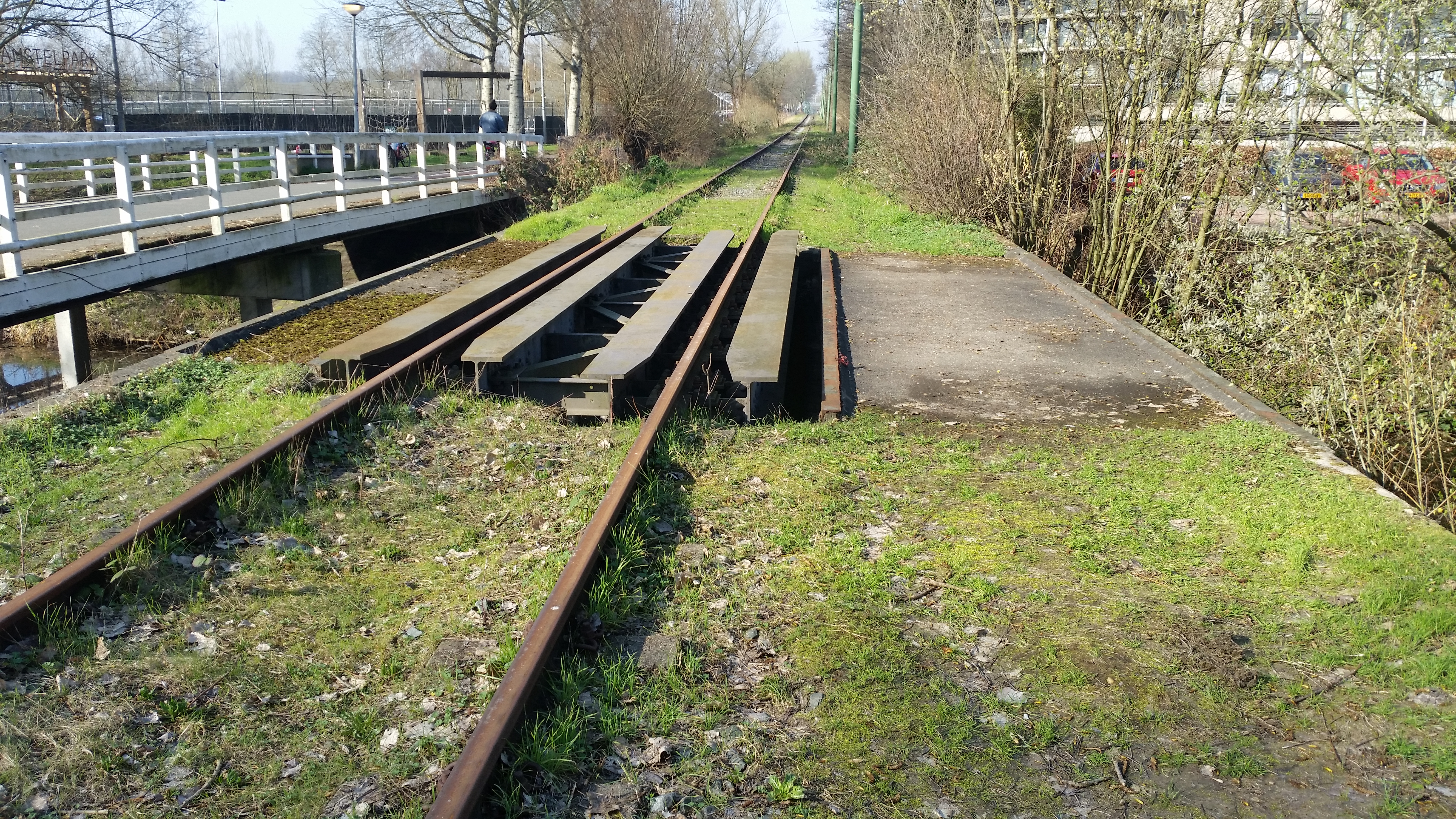 Spoorbrug naast Brug 1552 (in Amsterdam)